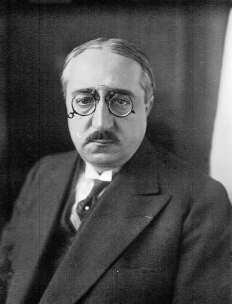 M. Antériou, ministre des pensions : photographie de presse